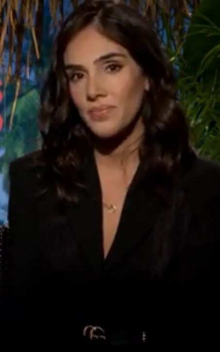 Sandra Echeverría en entrevista para Dulce Osuna en 2020